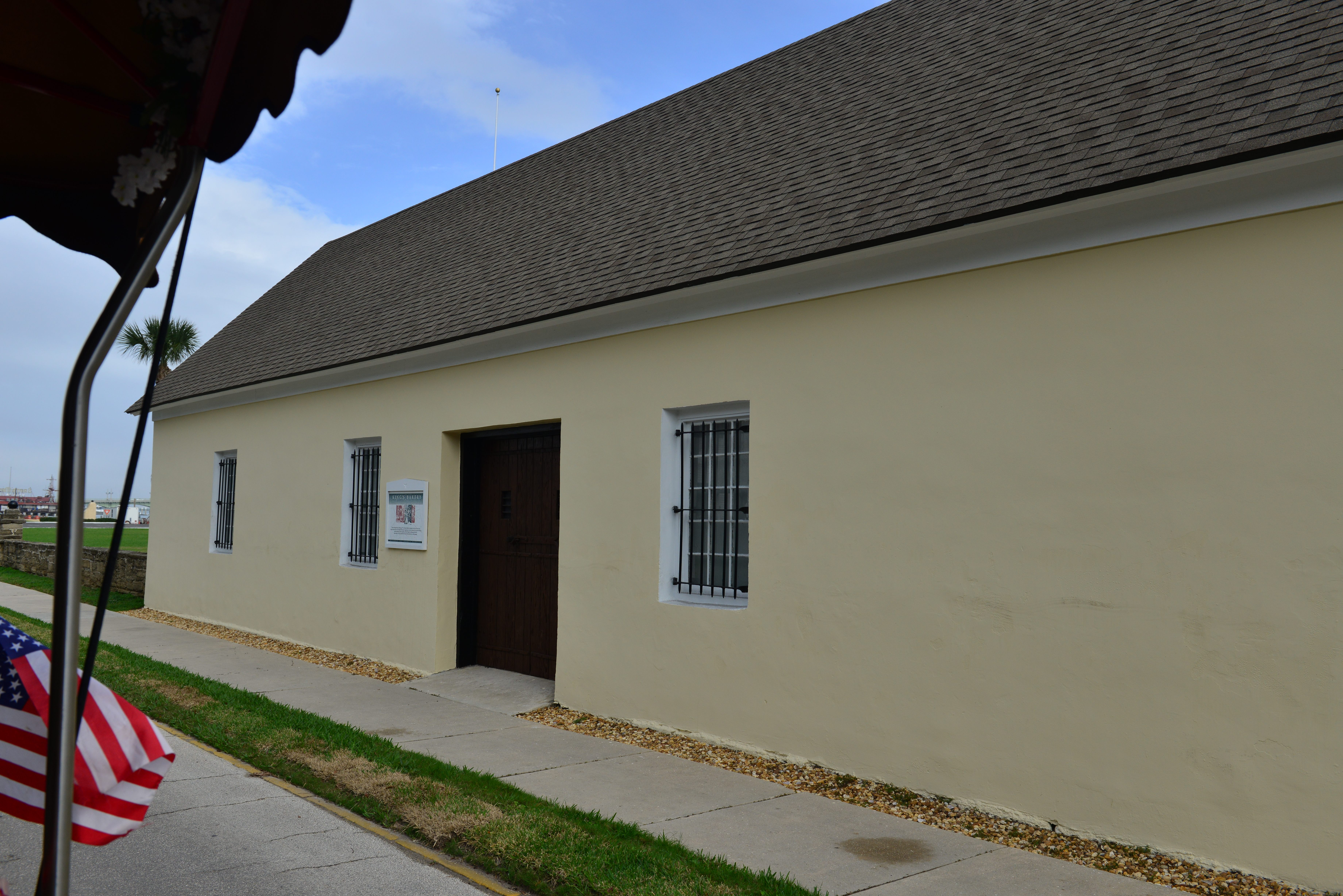 st augustine florida kings bakery